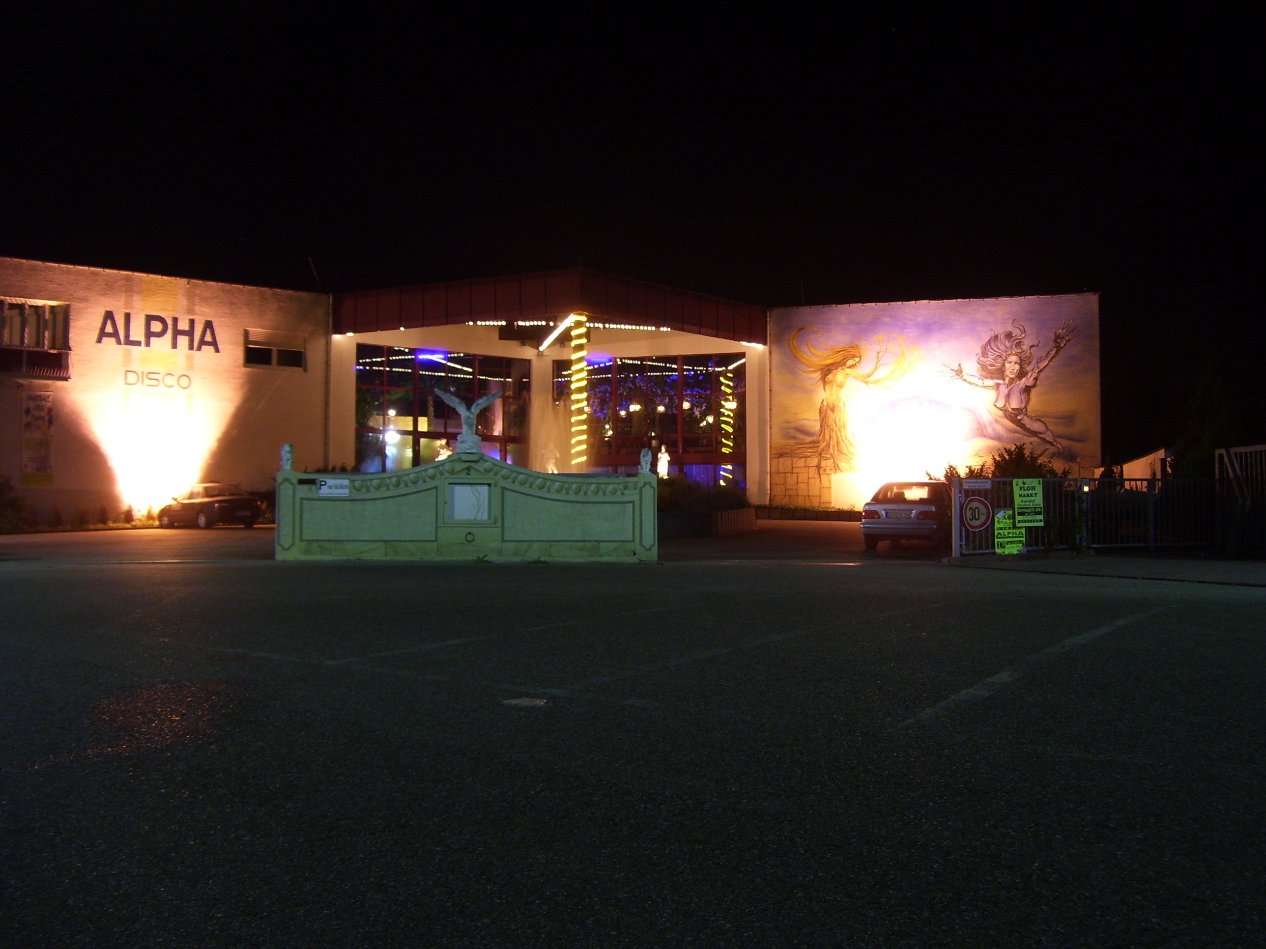 Aussenansicht der Diskothek "Alpha" in Kandel